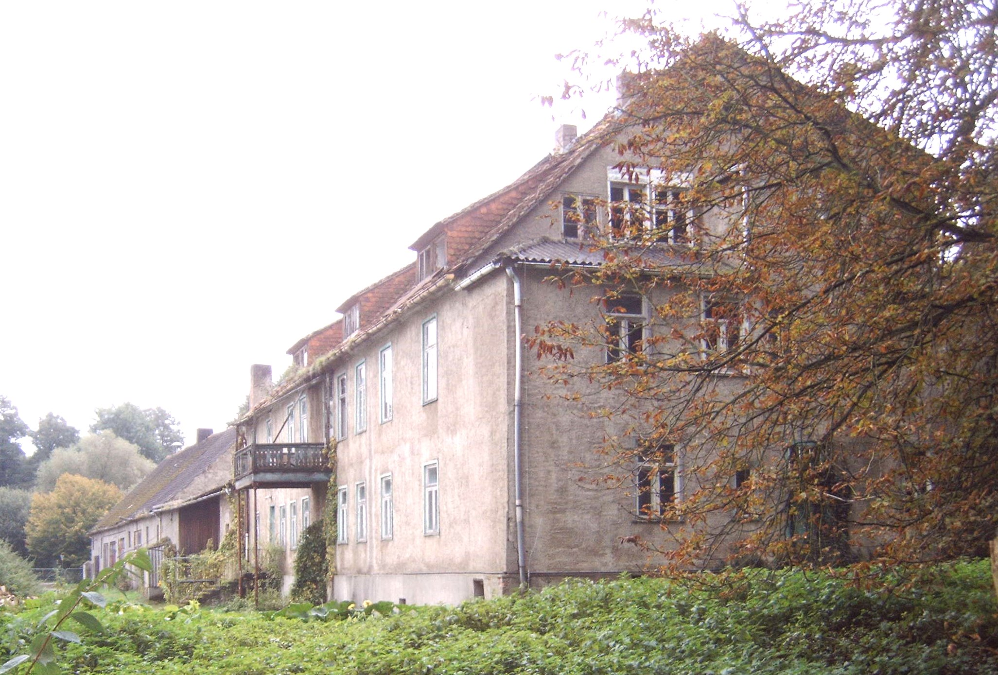 Gutshaus in Zichtau, Sachsen-Anhalt, Deutschland